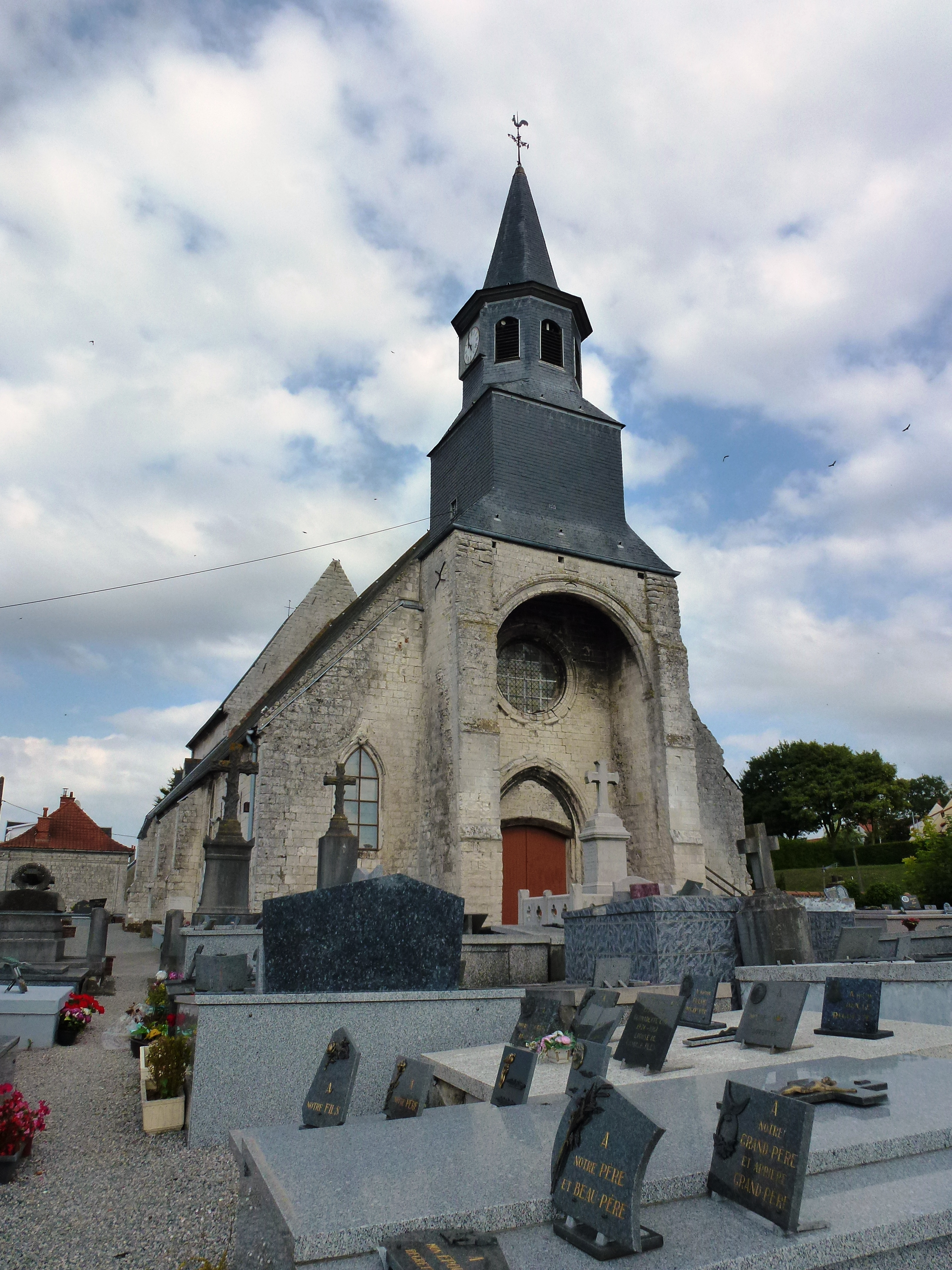 Tournehem-sur-la-Hem (Pas-de-Calais) église Saint-Médard PA00108434 .